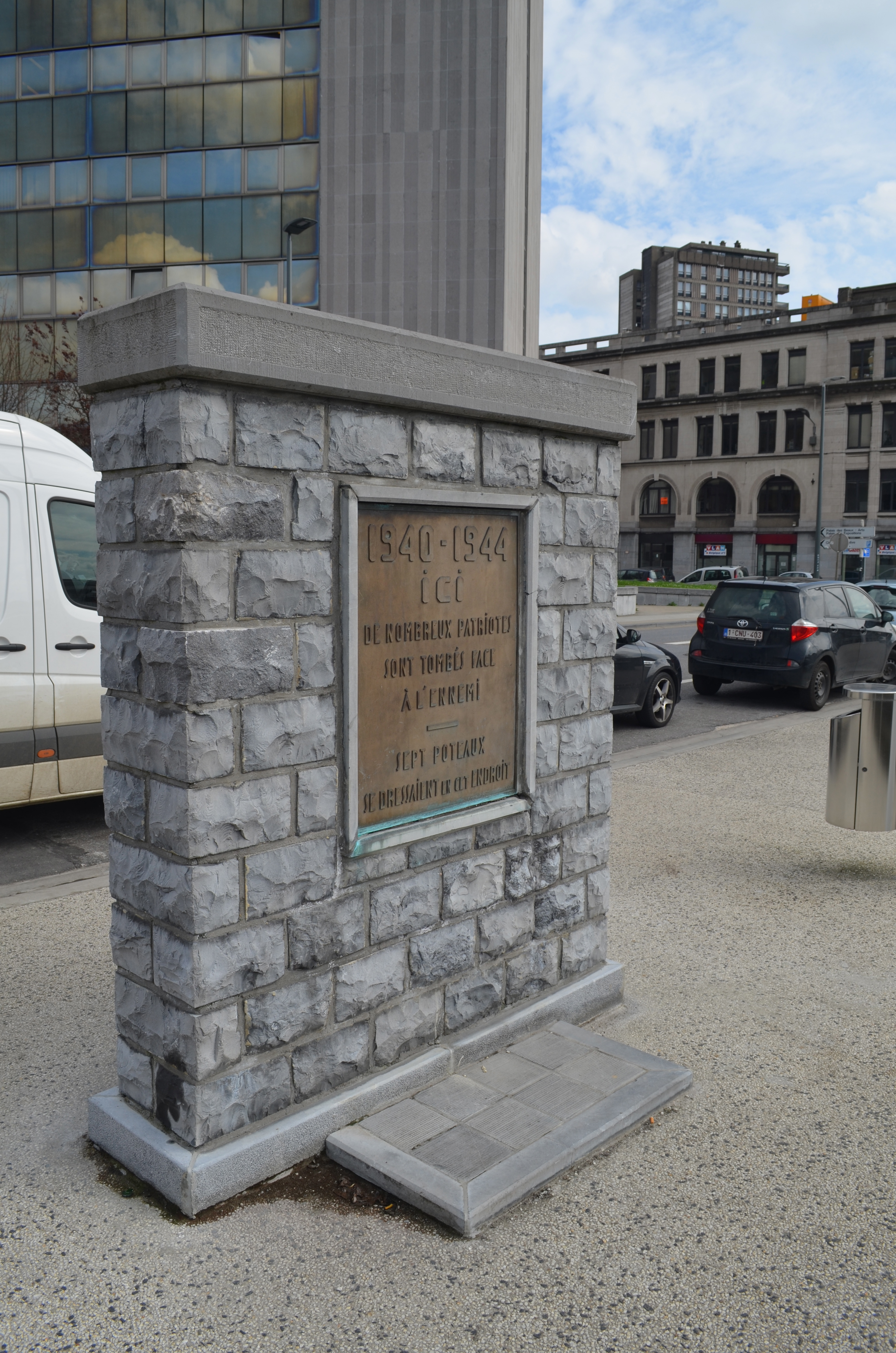 Charleroi - Monument placé devant l'emplacement de l'ancienne Prison de Charleroi.